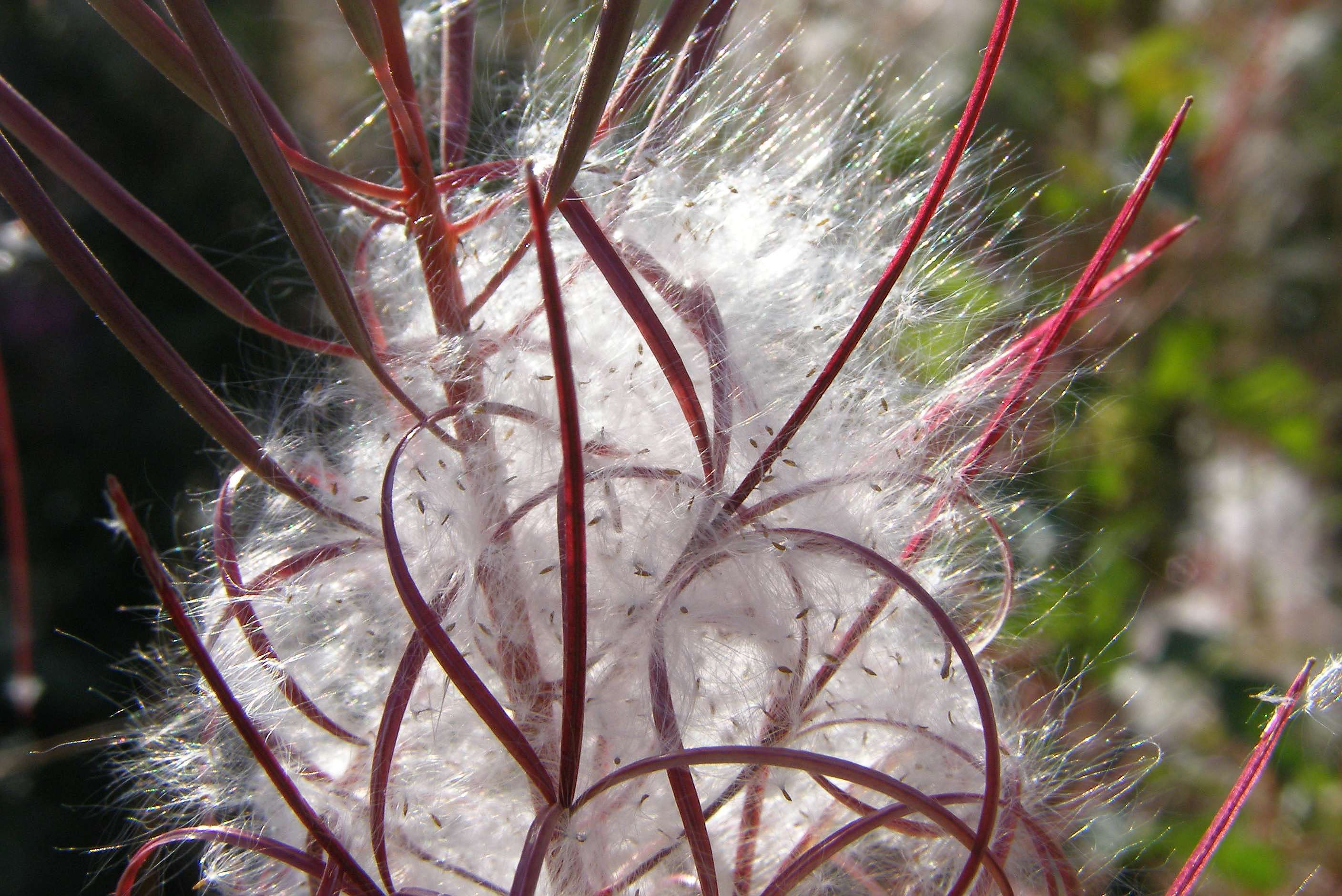 Schmalblättriges Weidenröschen (Epilobium angustifolium), Samenstand